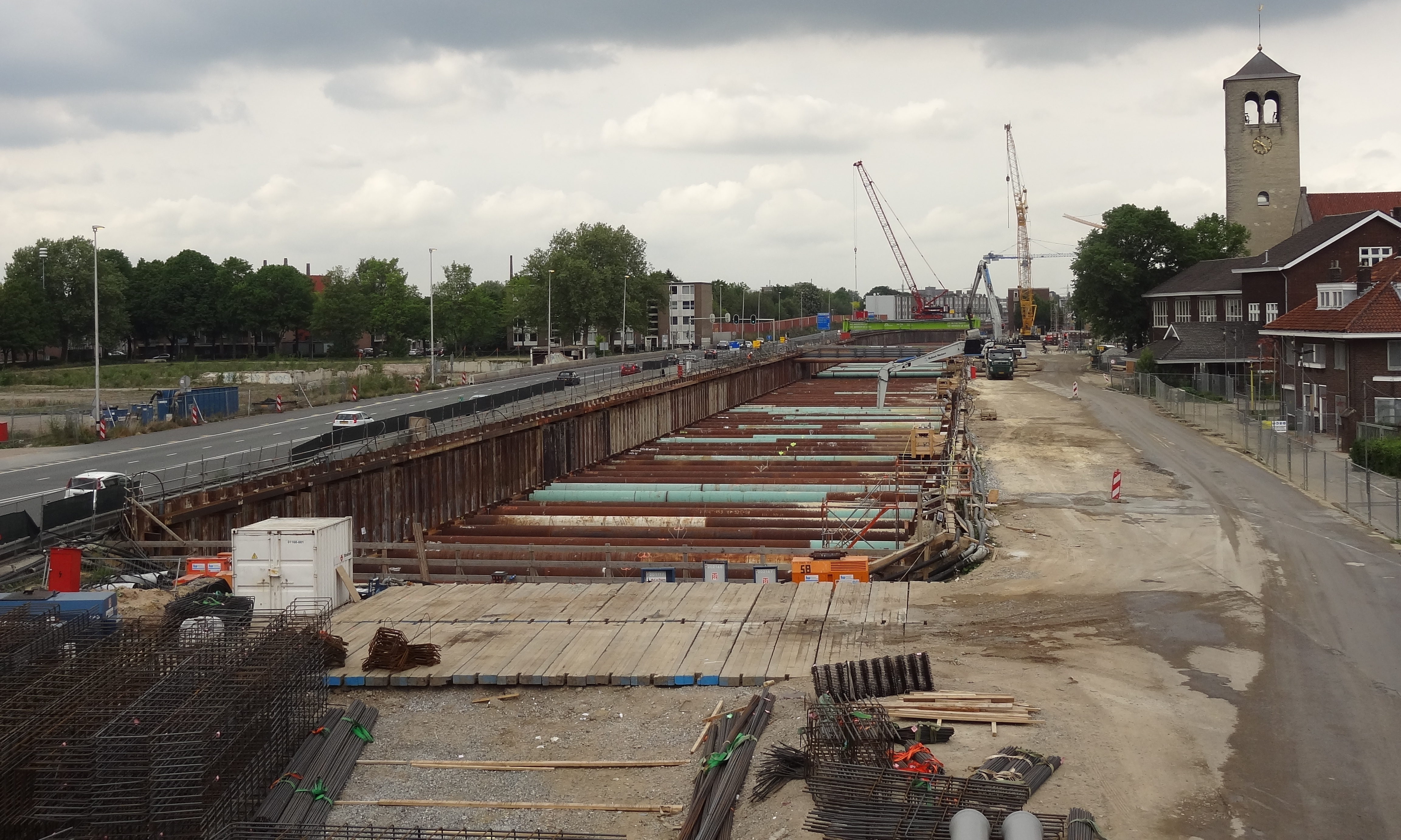 Werkzaamheden A2 tunnel Maastricht